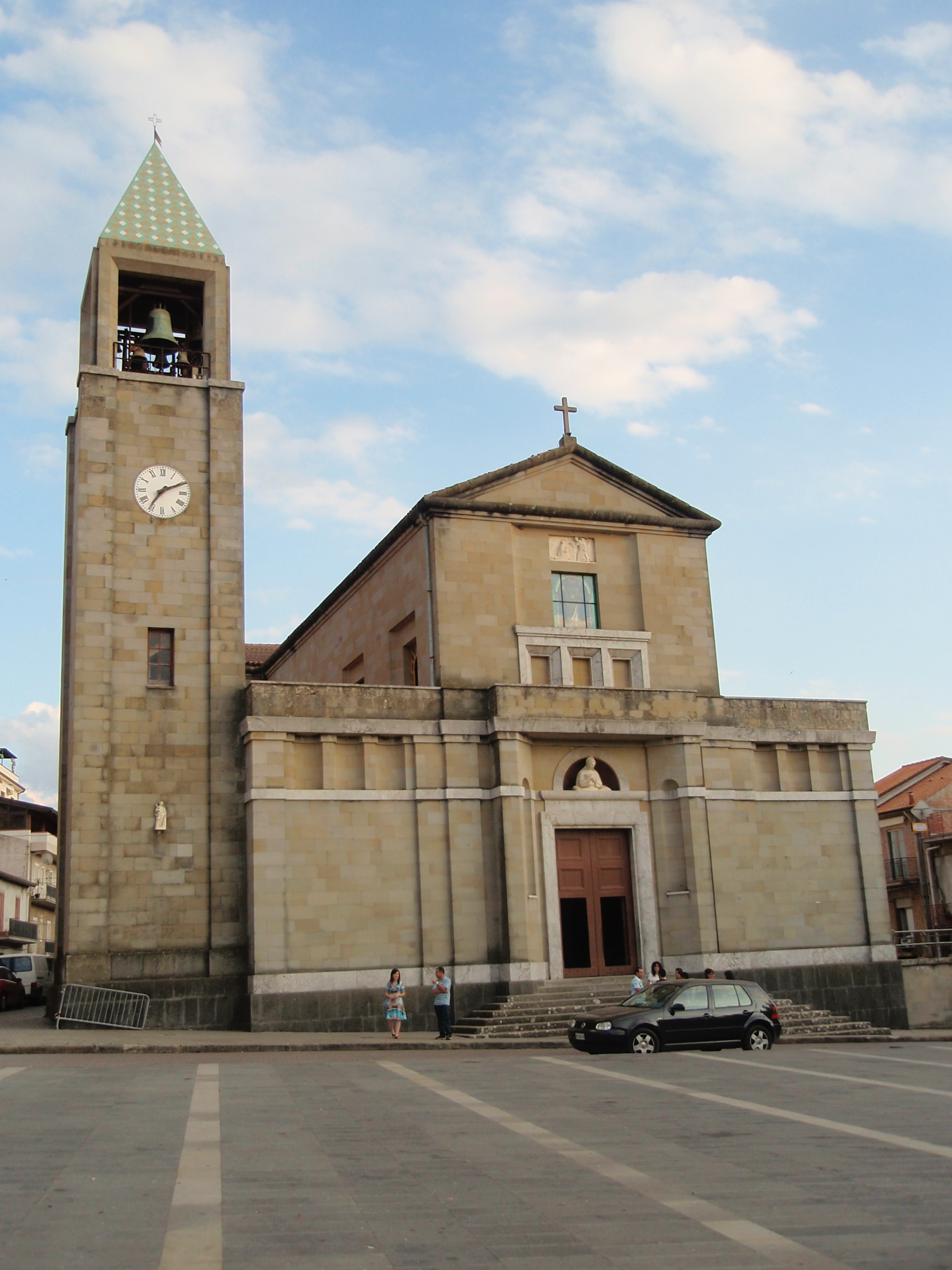 Orazio Filippelli, archivio privato, Chiesa di SS.Maria Assunta,GFDL sono l'autore